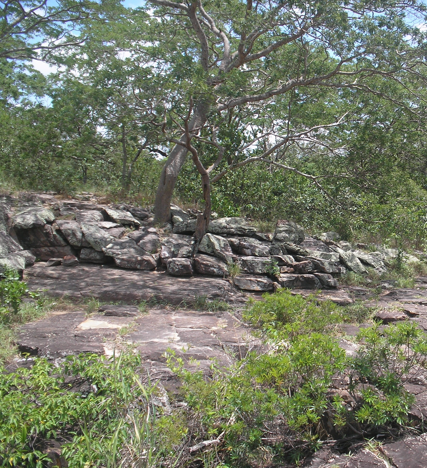 Formação rochosa na Serra do Cipó, MG